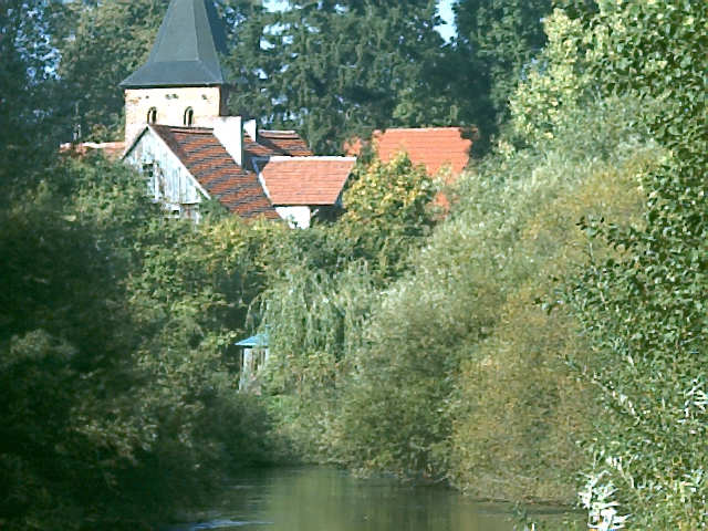 Widok od strony Słupi